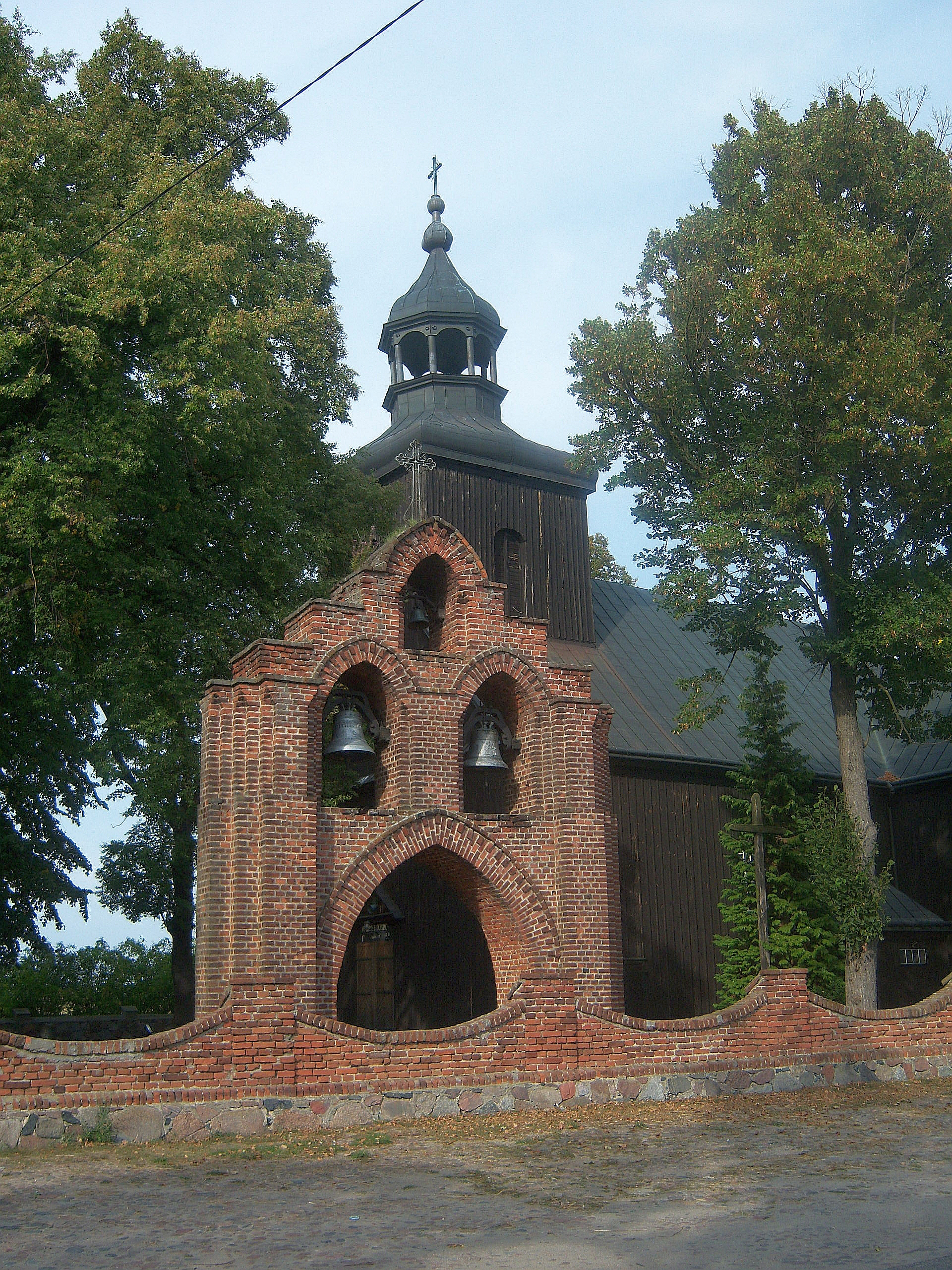 Kościół śś. Piotra i Pawła w Kowalewie-Opactwie - strona płd.-zach.